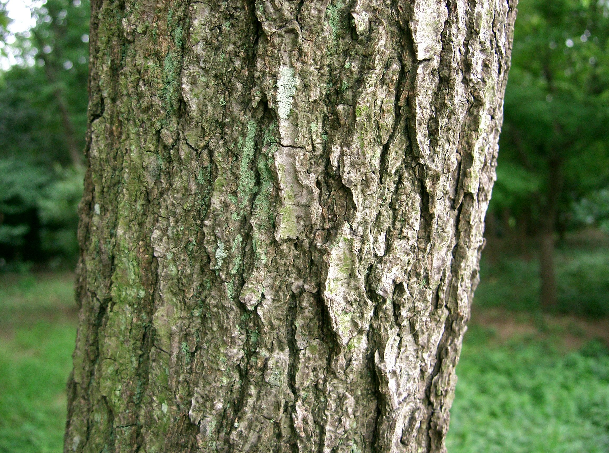 Scientific name Alnus japonica